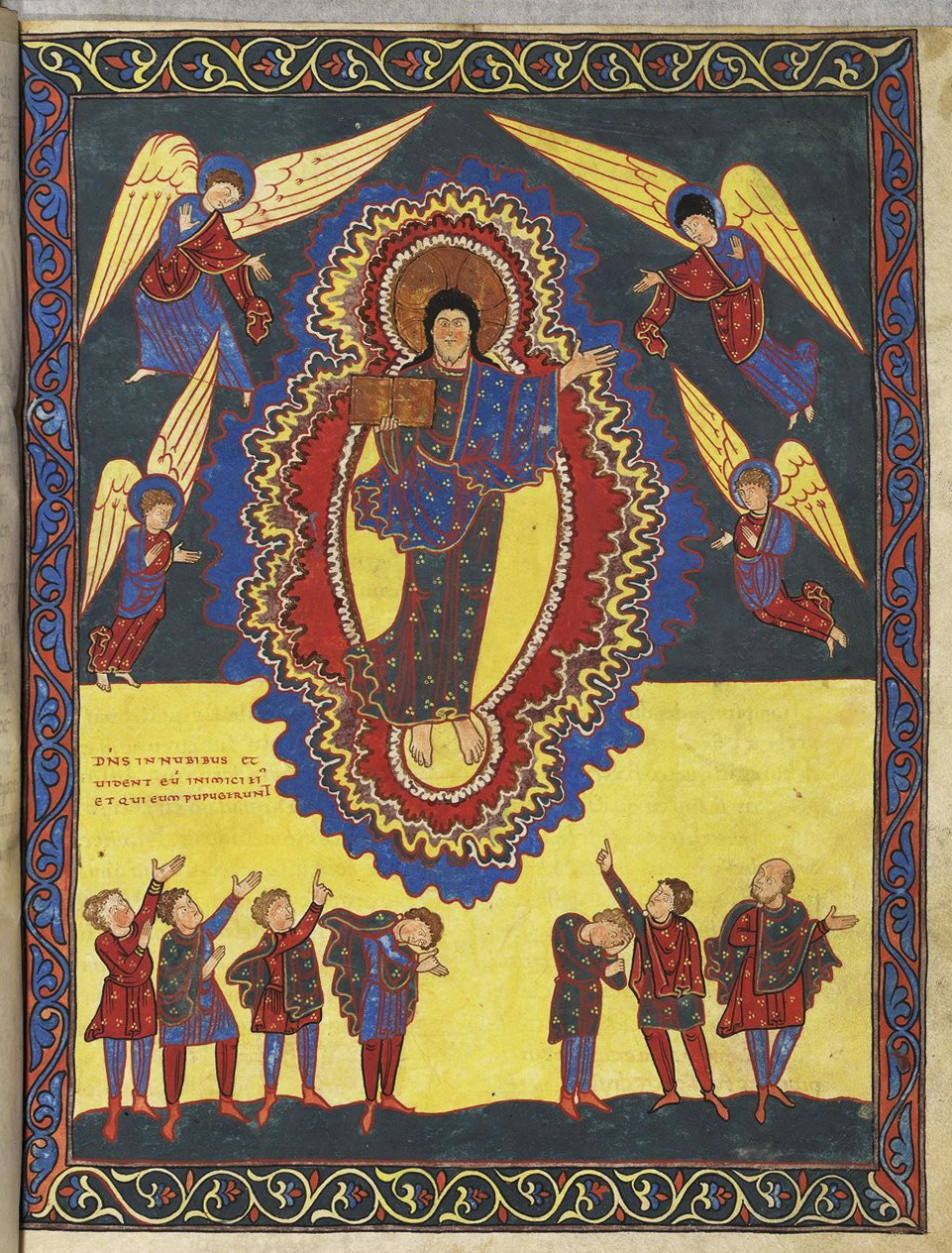 Eluminure Apocalypse de Saint Sever. Latin 8878, fol. 29, Christ au milieu des nuées (he cometh with clouds)